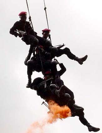 Denjaka Stabo